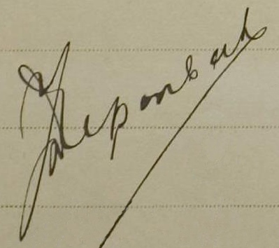 Подпись Яна ван Дипенбека